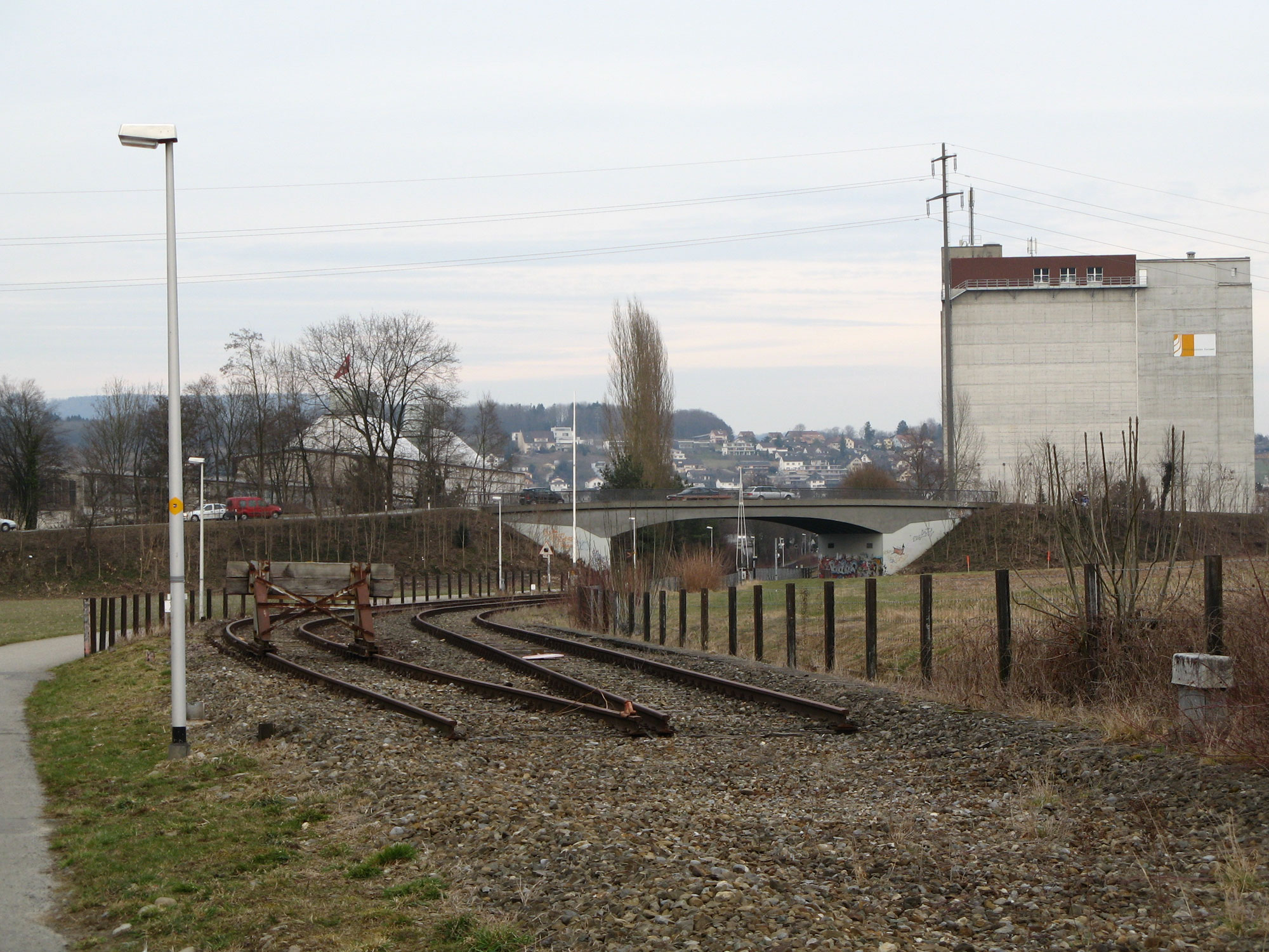 Streckenende der Wohlen-Meisterschwanden-Bahn am nördlichen Dorfrand von Villmergen.